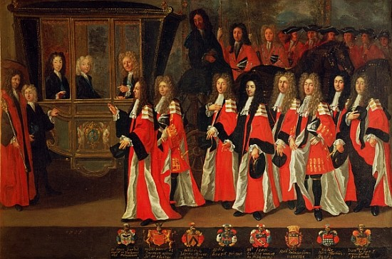 Les capitouls de l’année 1700-1701 et l’entrée des ducs de Bourgogne et de Berry accompagnés du maréchal de Noailles. De gauche à droite : Jean Gardel, Capitoul de Saint-Étienne, Pierre de Barravy, de la Daurade, Louis Larieu, du Pont-Vieux, Joseph Ponsard, de la Pierre-Saint-Géraud, Jean Cousse de la Dalbade, Jean d’Olivier de Saint-Pierre-des-Cuisines, Jean-Thomas Saget de la Saint-Barthélemy et Jean de Roaix de Saint-Sernin.